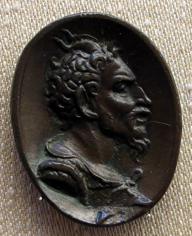 Placchette rinascimentali